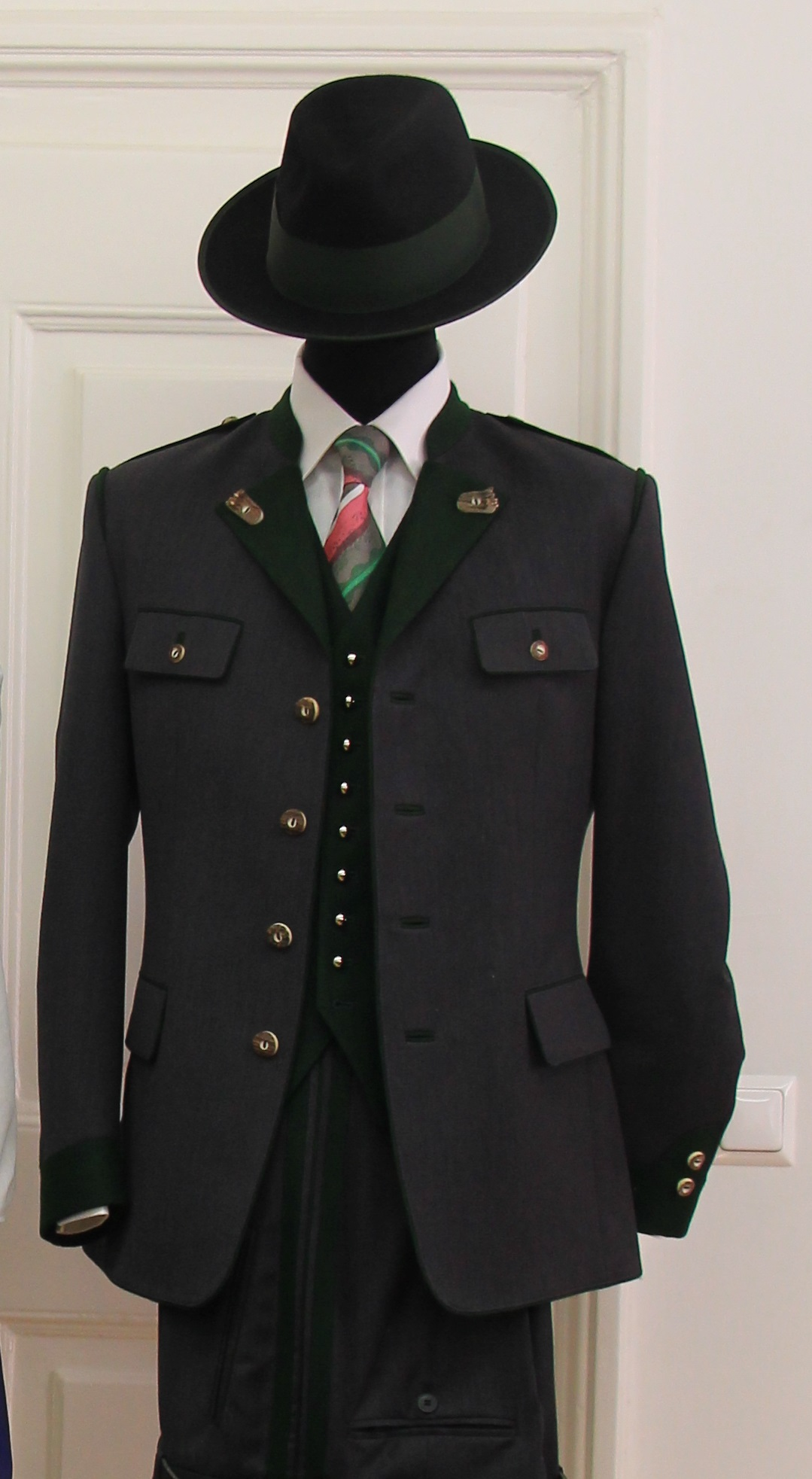 Besuch im Steirischen Heimatwerk im Zuge der Sommeruni Graz-Wien-Salzburg - Steirisches Dirndl und Steireranzug